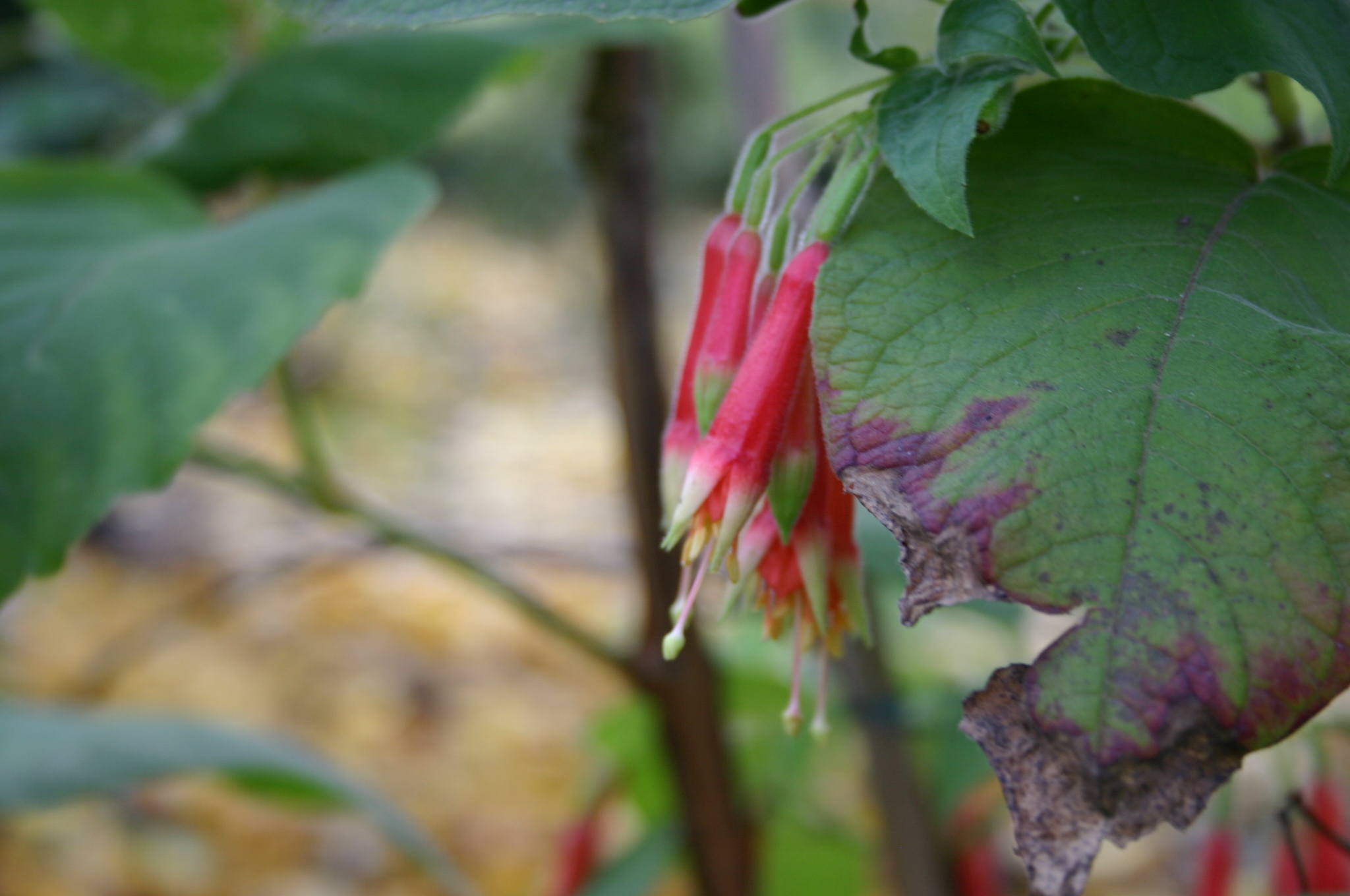 Fuchsia campii, Hortus Botanicus, Amsterdam